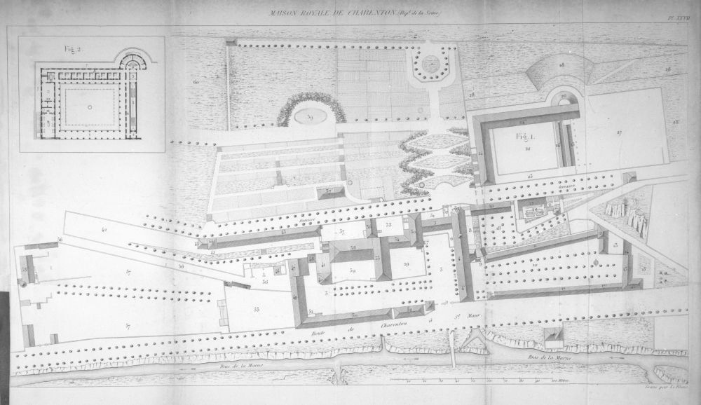 Plan de la maison royale de Charenton. Lithographie de Le Blanc publiée dans l'ouvrage de Jean Étienne Dominique Esquirol, Des maladies mentales considérées sous les rapports médical, hygiénique et médico-légal, Paris, Baillière, 1838.